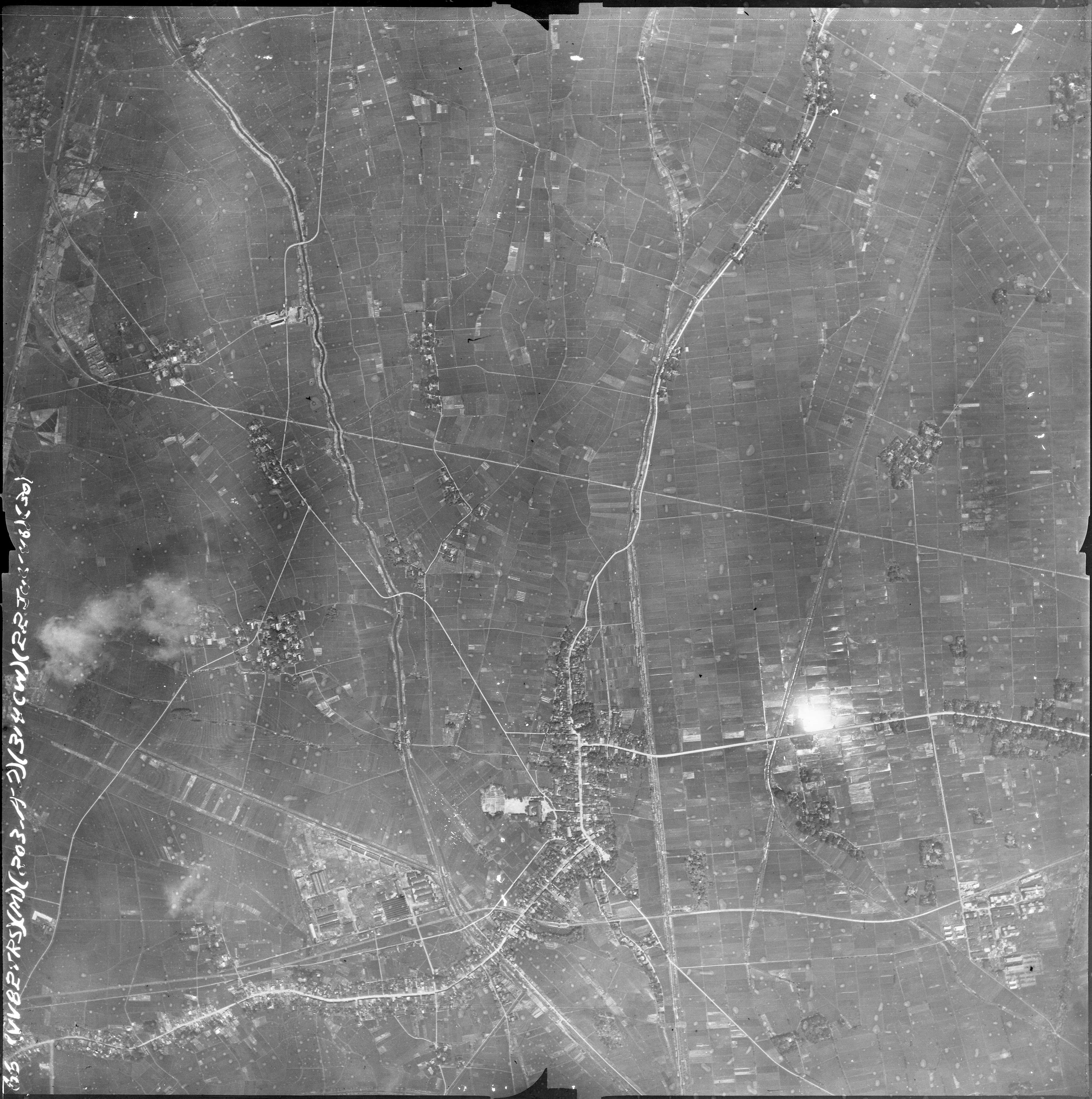 1946年（昭和21年）7月22日、米軍による撮影。